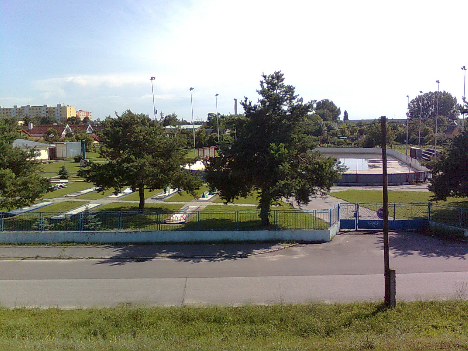 zimný štadión a minigolf